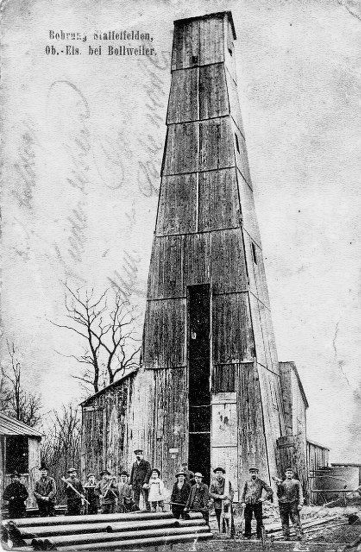 Le sondage de Stafelfelden.